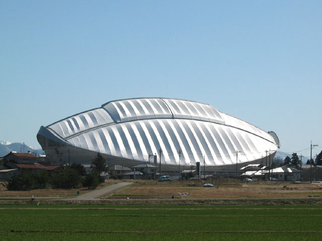 小松市林町にある多目的ドーム。膜式の屋根は開閉が可能。愛称は「ゆめたまご」。